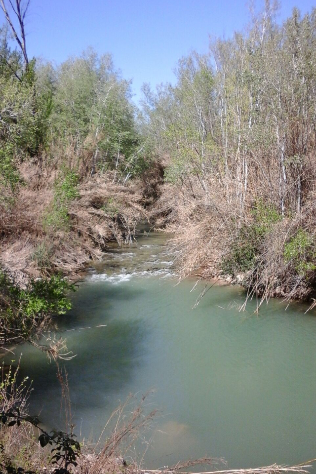 Bosque de Cañaverosa atravesado por el río Segura. Espacio protegido situado entre los municipios de Moratalla y Calasparra (Región de Murcia, España)